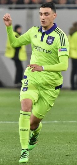 Матіас Суарес - футболіст Андерлехта